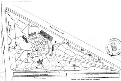 Srpski (latinica): Plan izložbe Narodne bašte koja je organizovana 1905. godine